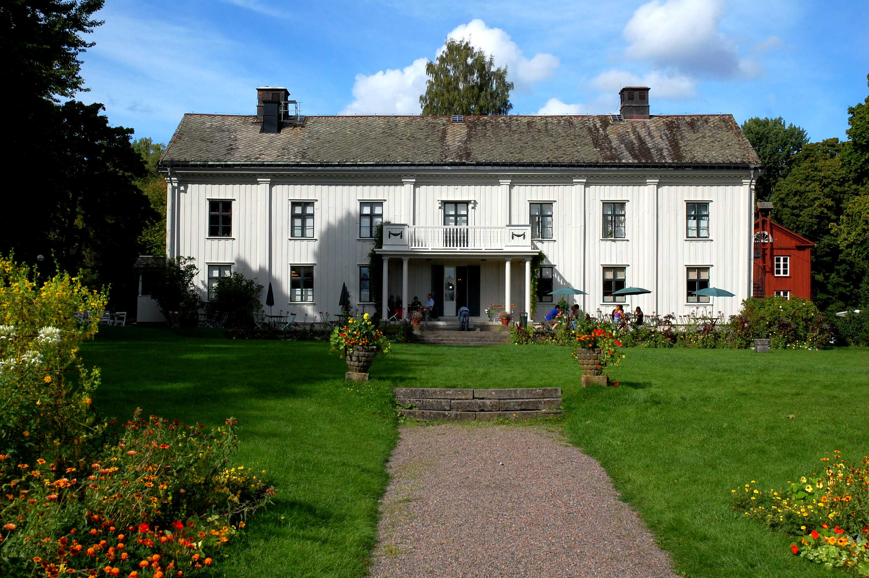 Alsters herrgård